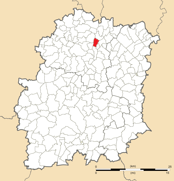 Carte de position de Ballainvilliers en Essonne.